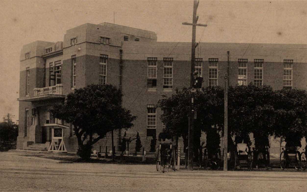 中文（台灣）: 新竹州商工獎勵館建於1932年，位於新竹市榮町一丁目38番地。